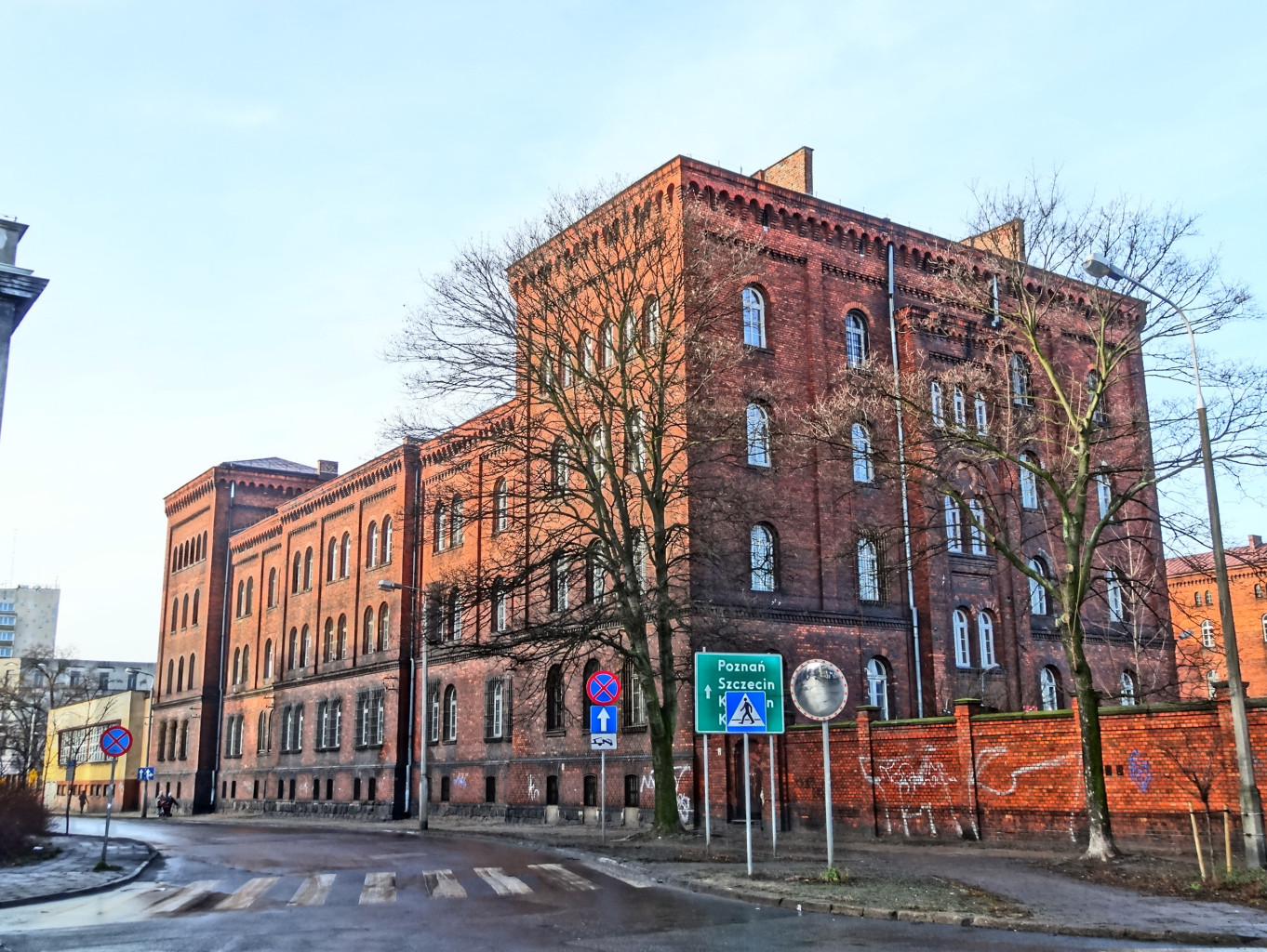 Kompleks wojskowy (dawne koszary, komenda garnizonu itp.) zawarty między ulicami: Zygmunta Augusta, Sowińskiego, Sobieskiego i Warszawską w Bydgoszczy